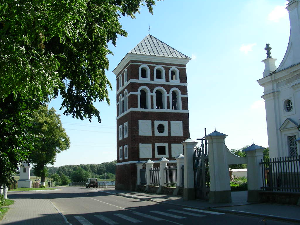 Беларуская (тарашкевіца): Комплекс былога кляштара езуітаў:касьцёл Божага Цела з дэкаратыўным аздабленьнем:росьпісы ў інтэр’еры, выкананыя пад кіраўніцтвам К. Д. Гескага; алтарная карціна «Тайная вячэра» К. Д. Гескага;надмагільныя помнікі і барэльефы: Мікалая Крыштапа Радзівіла Сіроткі, Канстантына Радзівіла, Эльжбеты Яўфіміі Радзівіл, Крыштапа Радзівіла, Ігната Мураўскага, Канстанцыі Радзівіл, Людвіка Кандратовіча (У. Сыракомля);скульптуры на галоўным фасадзе:Сьв. Крыштапа, Сьв. Мікалая, Сьв. Францішка Ксаверыя, Ігнація Лаёлы;пахавальная крыпта роду Радзівілаў (70 трун-саркафагаў, канопа і урна з прахам);вежа;капліца Булгарына;агароджа з брамай. г. Нясьвіж This is a photo of Belarusian heritage monument. Reference number: 610Г000465 ( WLM)